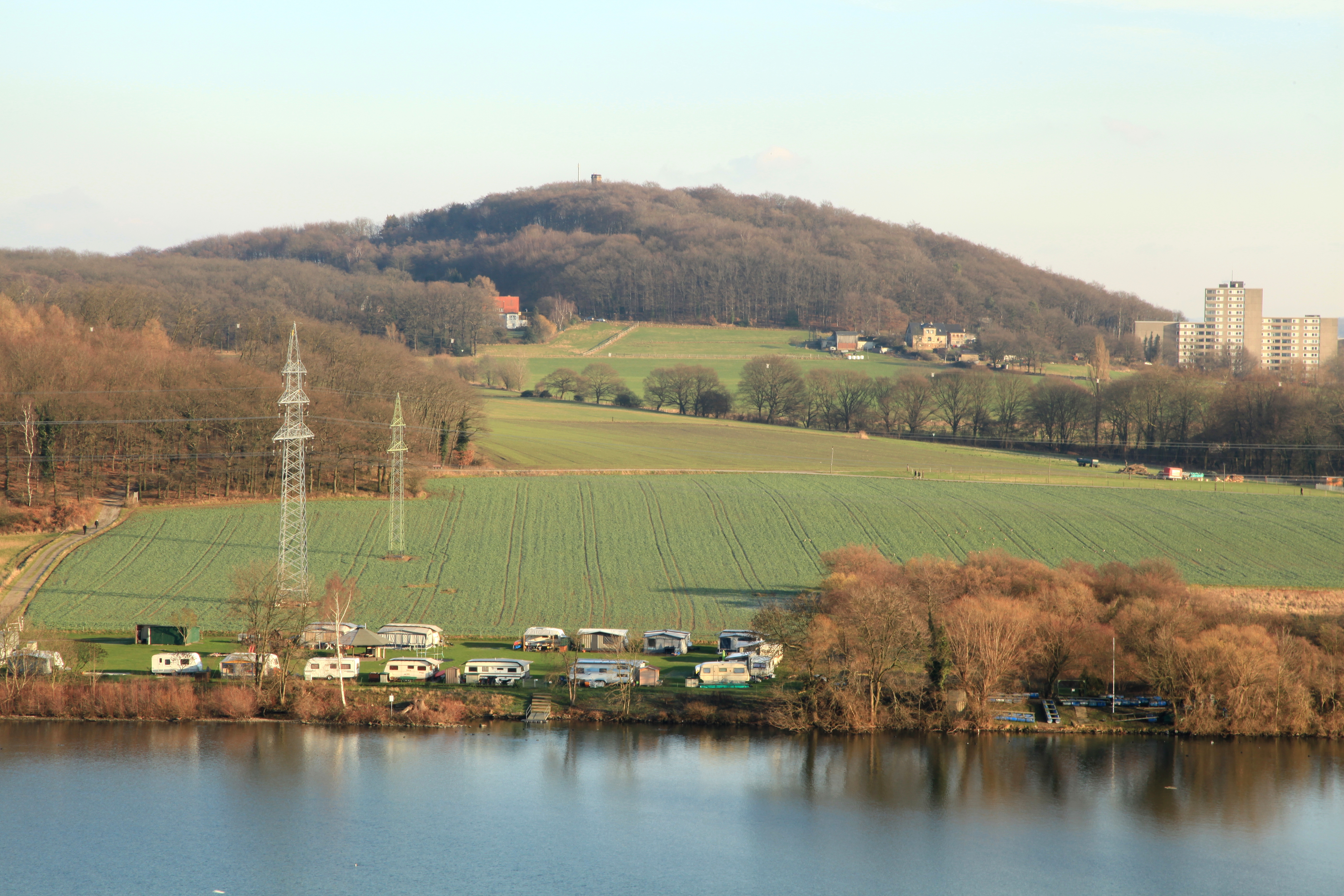 Blick von der Burg Wetter über den Harkortsee und Hagen-Baukey zum Kaisberg in Hagen; abgebildete Bereiche überwiegend gelegen im Landschaftsschutzgebiet „Werdringen/Kaisberg“. Links zwei 110-kV-Freileitungsmasten.